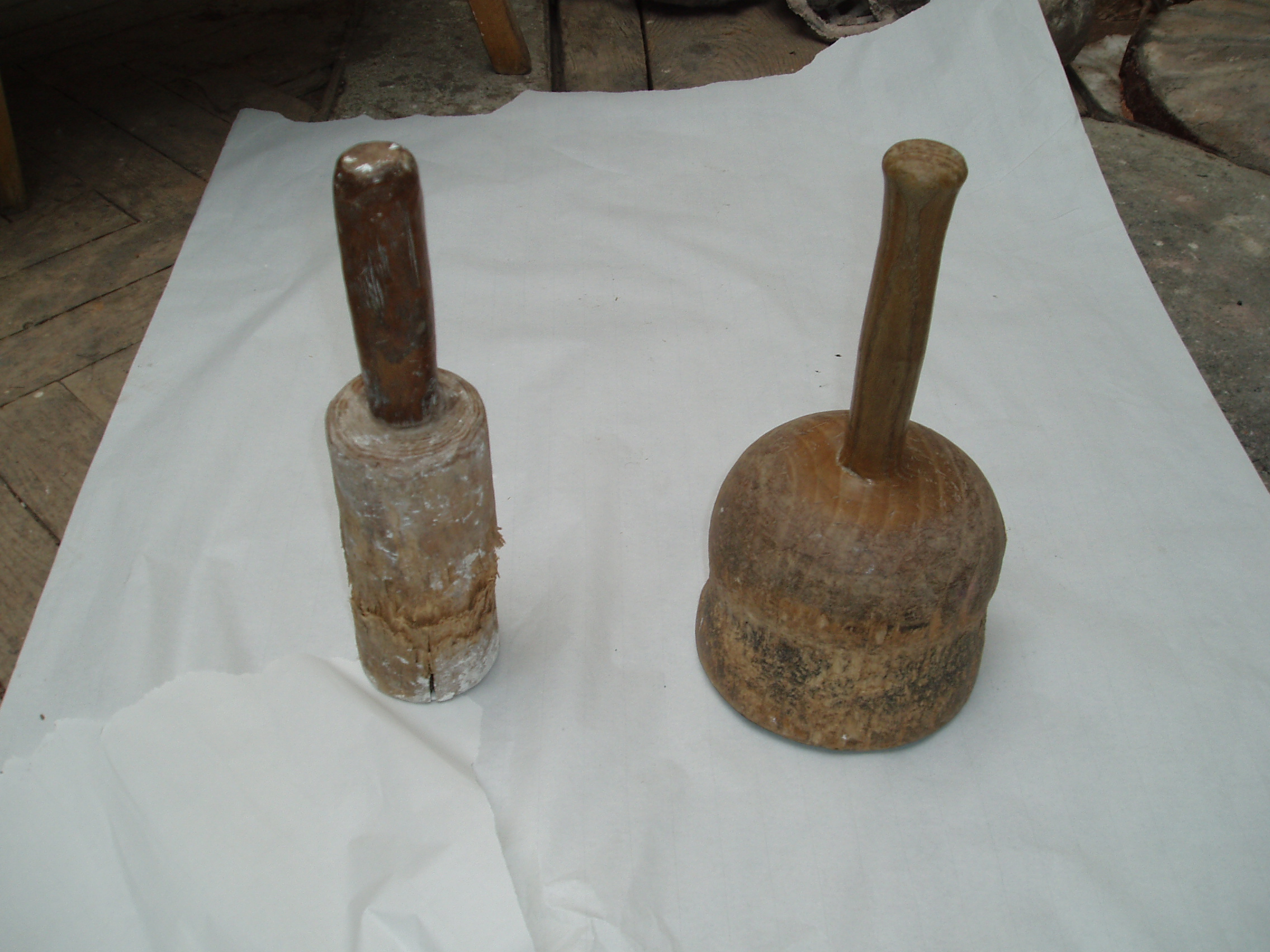 Kamenické nástroje - sbírka paliček